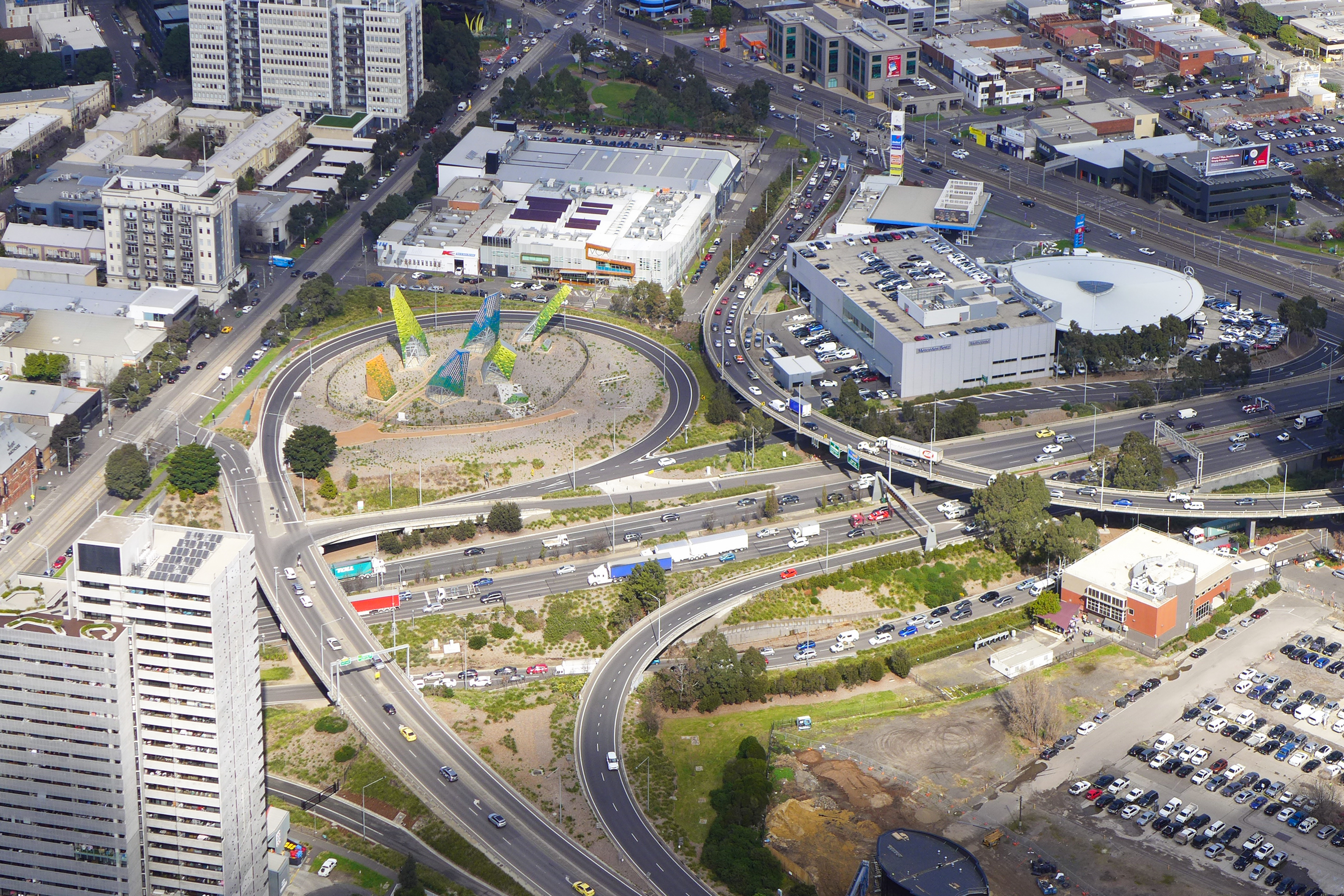 Habitat Filter